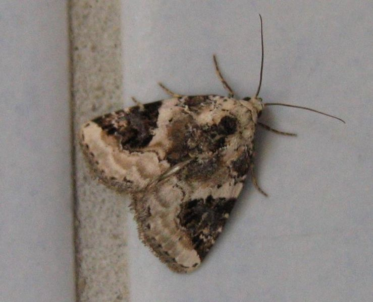 Pseudeustrotia candidula (Denis & Schiffermüller, 1775), Noctuidae, Lepidoptera, Groß Machnow, Brandenburg